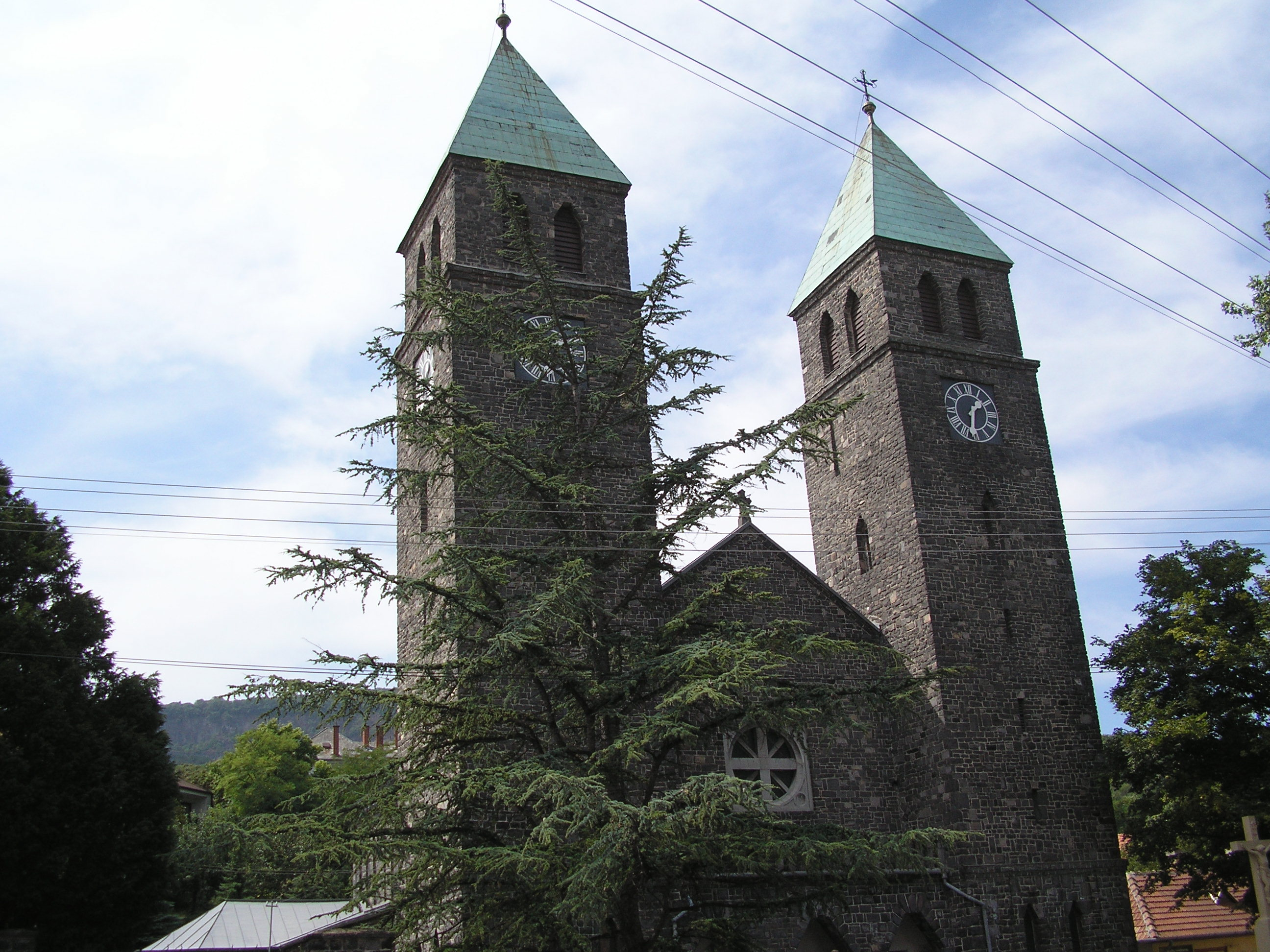 Badacsonytomaj - Szent Imre római katolikus templom